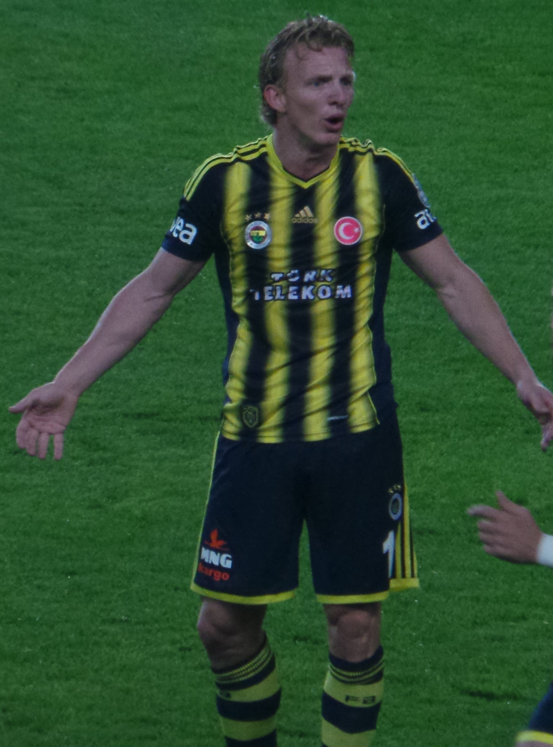 Dirk Kuyt'13-14